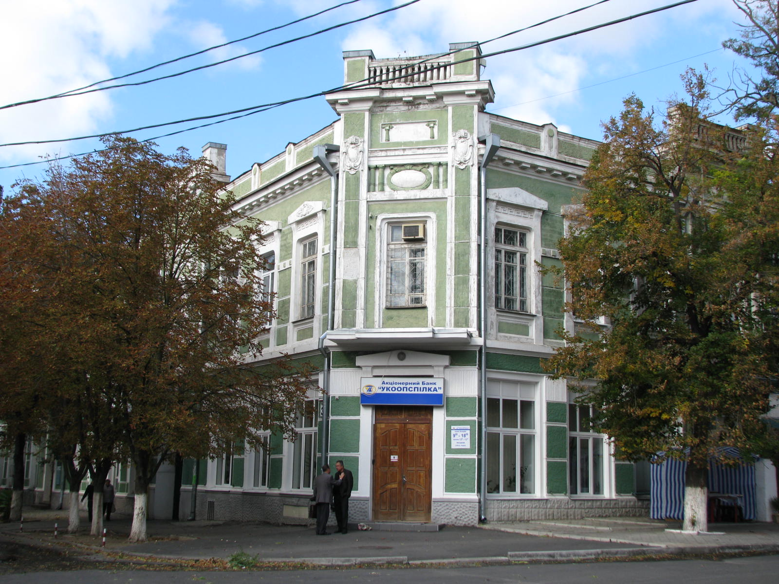 Житловий будинок (мур.), Херсон, 9 Січня вул., 30